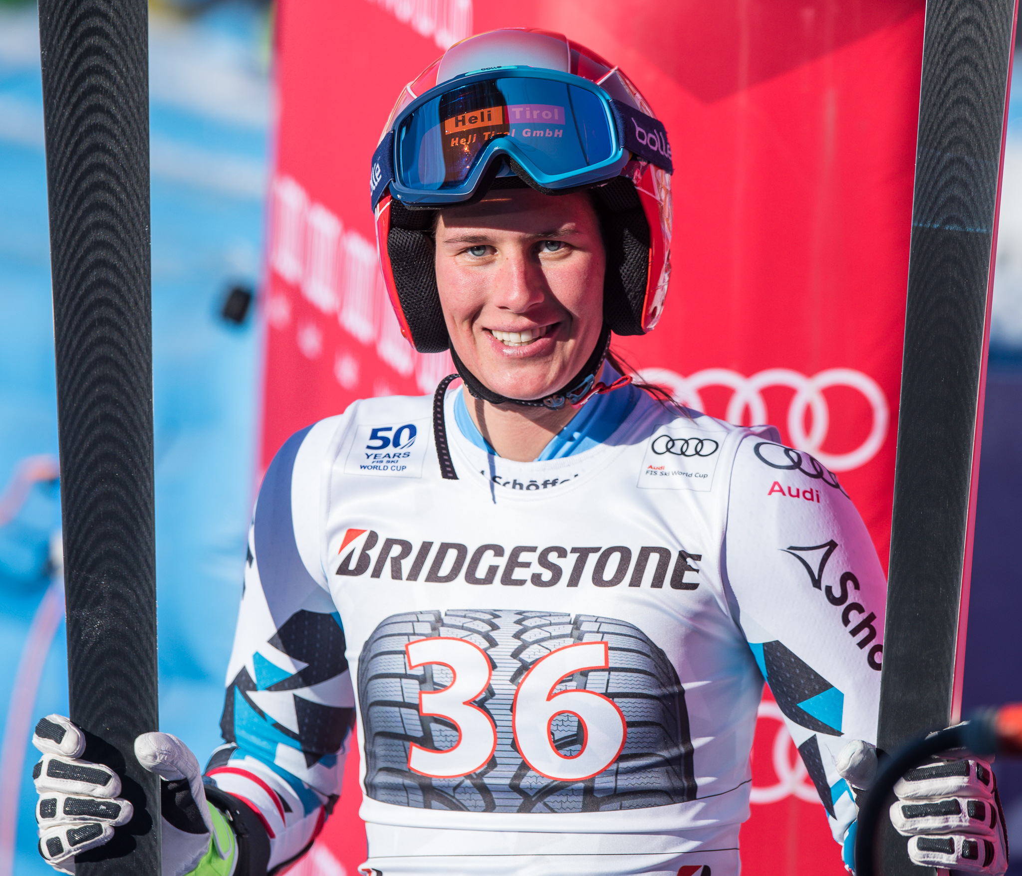 64. Kandahar Rennen,Audi FIS Ski Weltcup Garmisch-Partenkirchen,Damen Super-G,Kandahar,Ladies Super-G,Ricarda Haaser